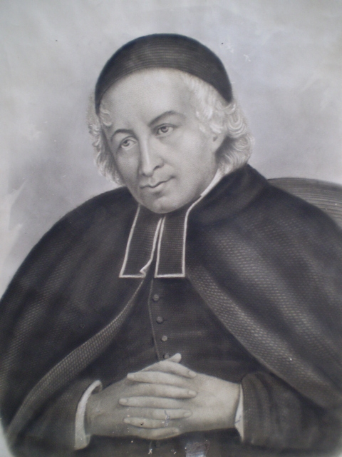 Retrato del Padre Louis Marie Baudouin